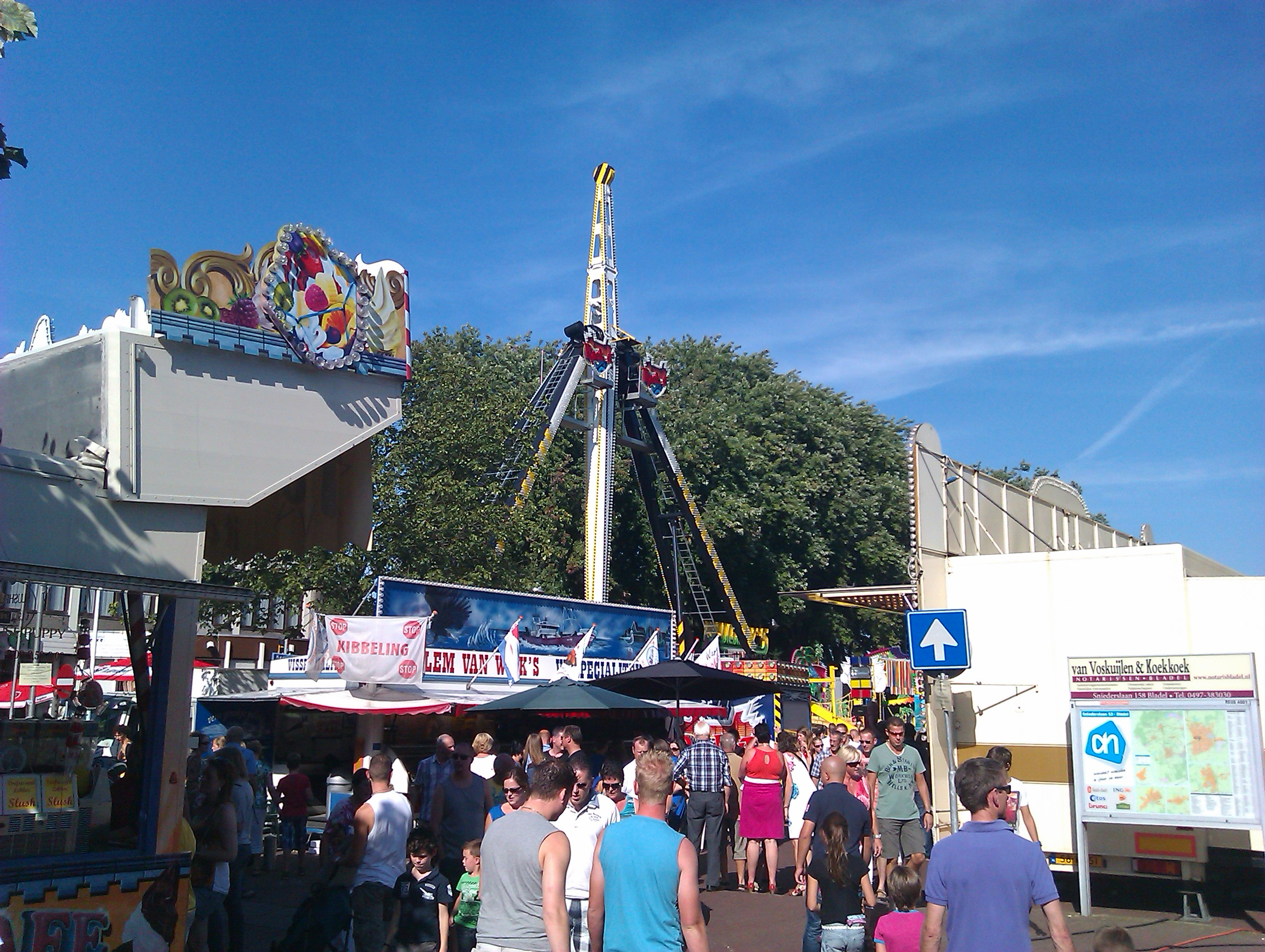 Reusel kermis 2012 zondag 9 september